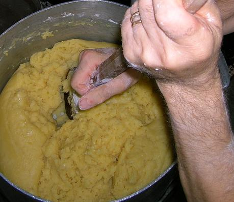 bignè